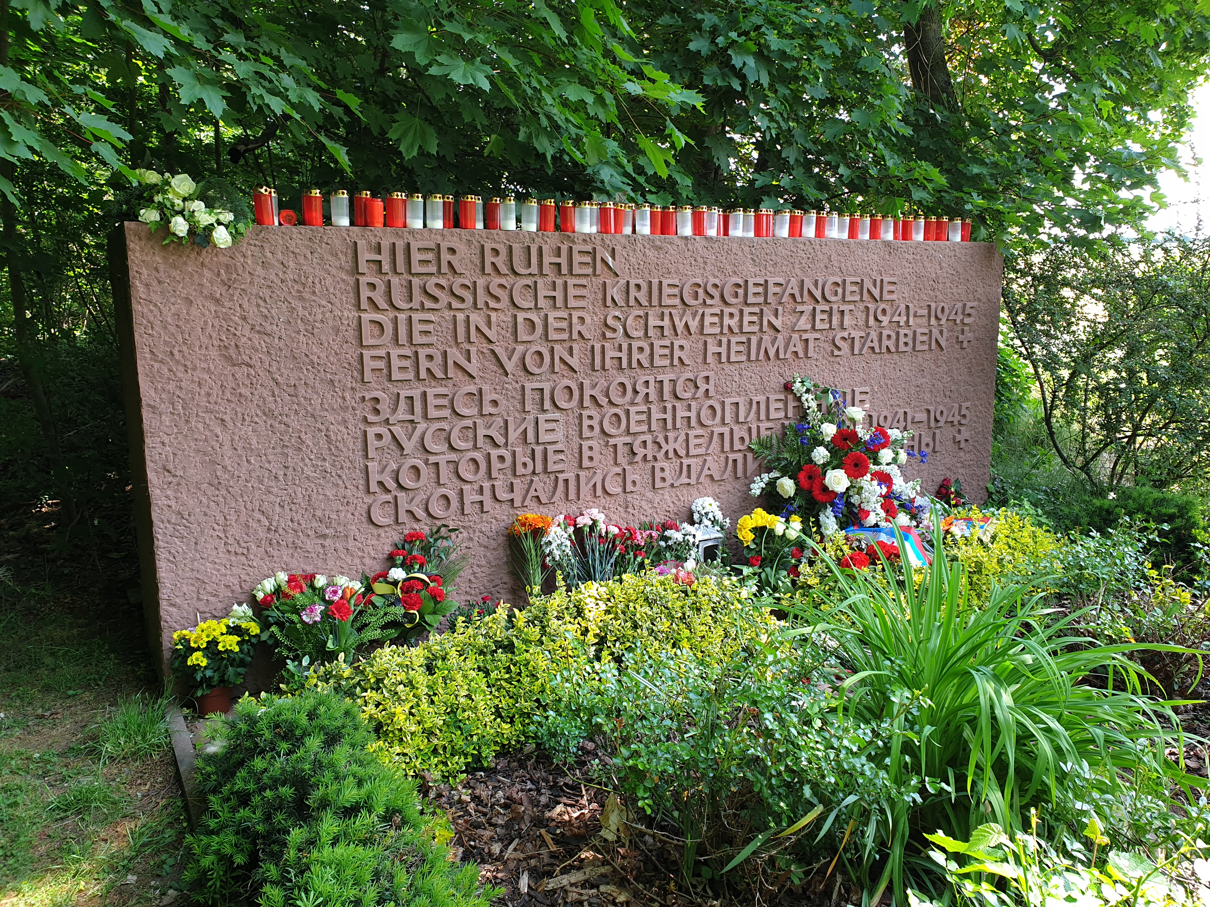 Gedenkstein am nordwestlichen Rand des Friedhofes - Fotografiert in der Woche des 75. Jahrestag VE-Tages